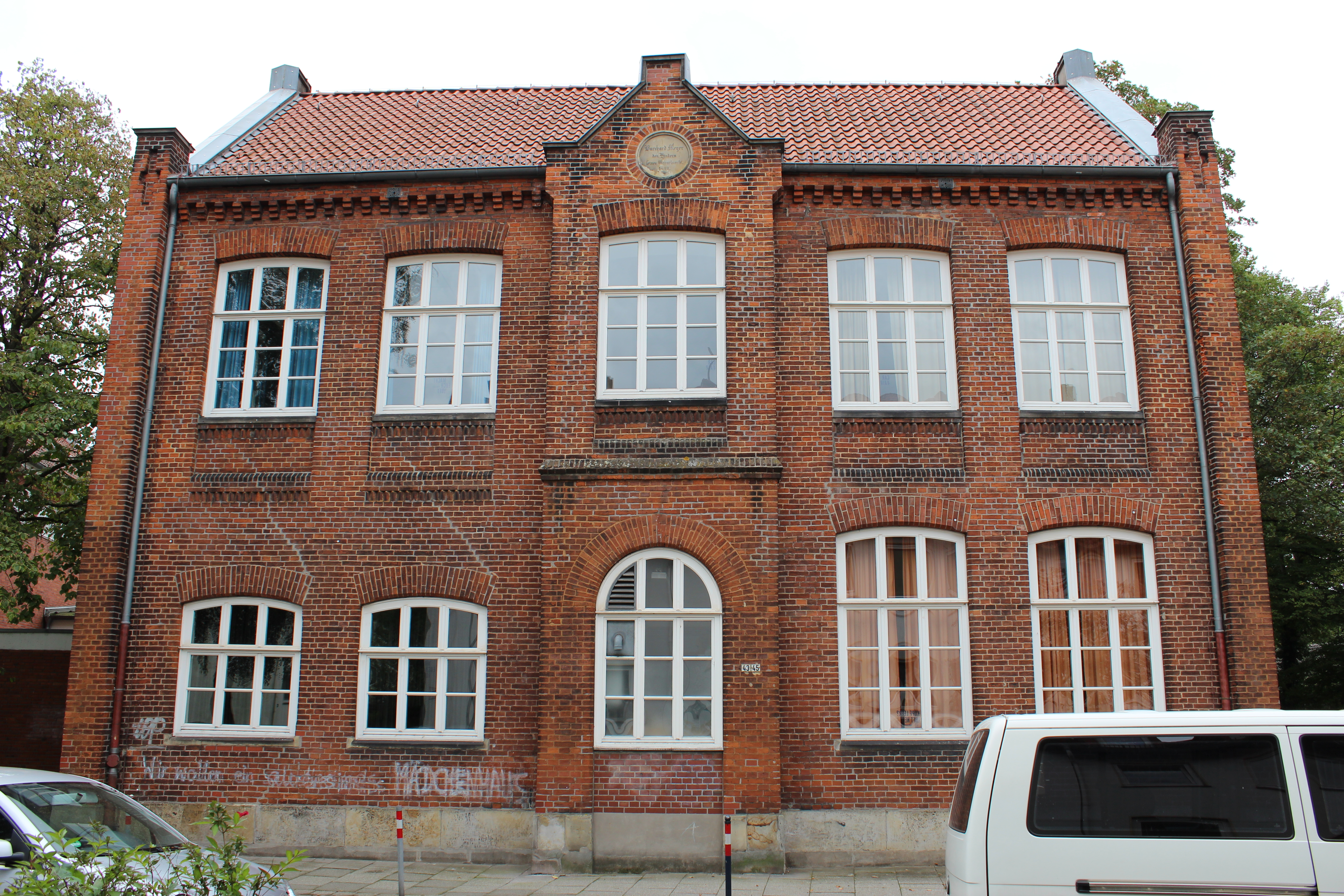 Gemeindeschule Walle in Bremen, Ritter-Raschen-Straße 43, 45.Das abgebildete Objekt ist ein geschütztes Kulturdenkmal in der Freien Hansestadt Bremen, mit der Nr. 1039 beim Landesamt für Denkmalpflege registriert.